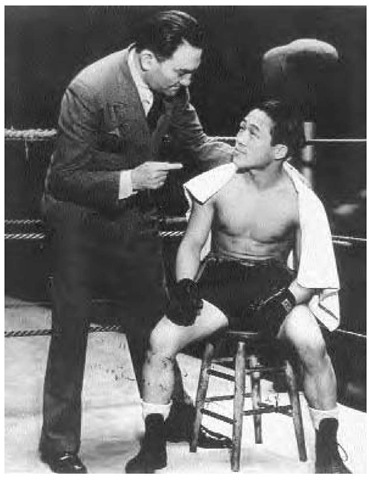 Le boxeur coréen Joe Teiken avec son entraîneur Frank Tabor lors d'un combat en Californie en 1933.